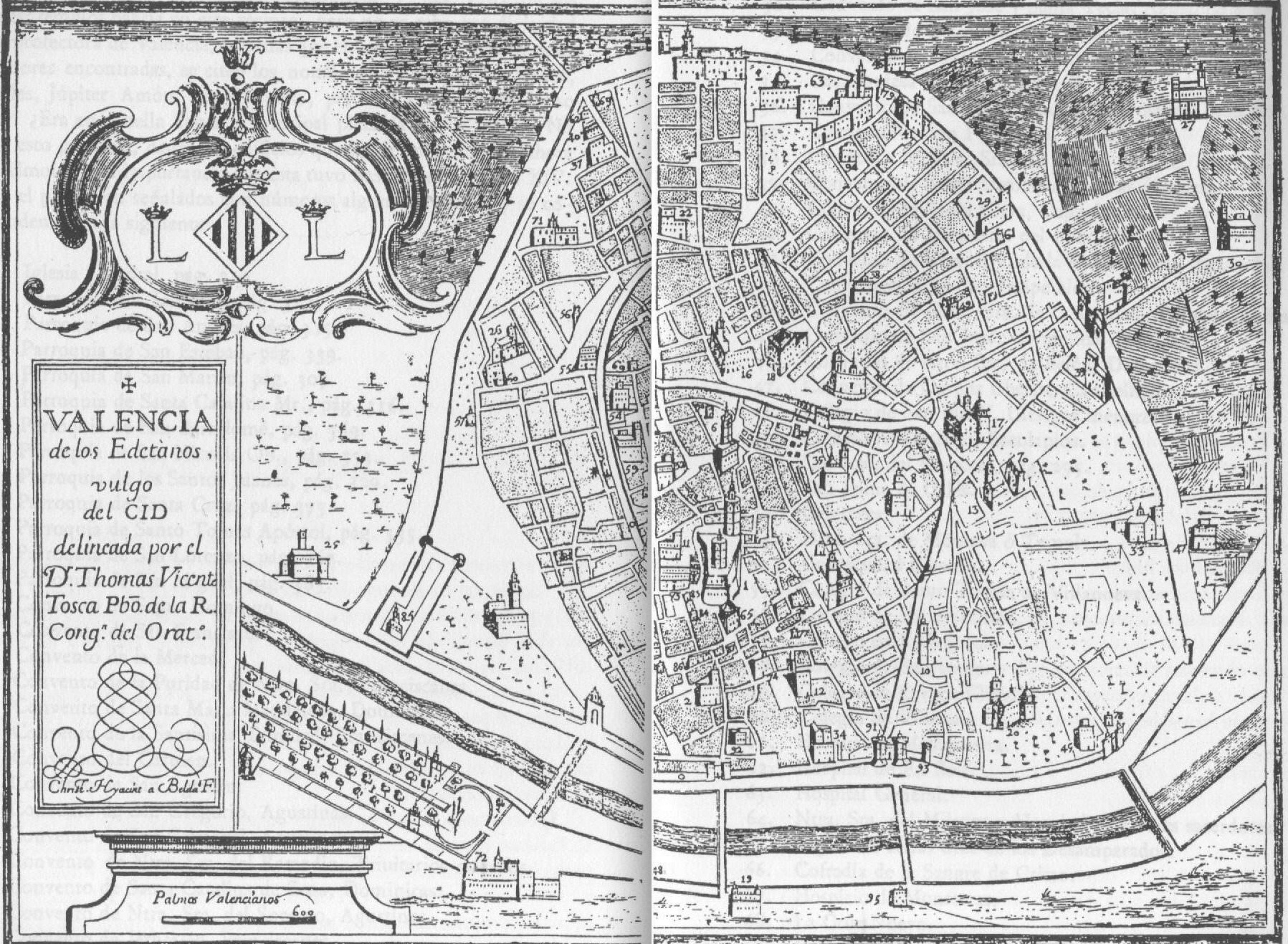 Valencia de los edetanos vulgo del Cid